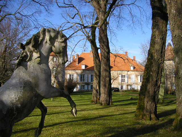 Chateau de la Chétardie, Exideuil Sur Vienne, Charente, France